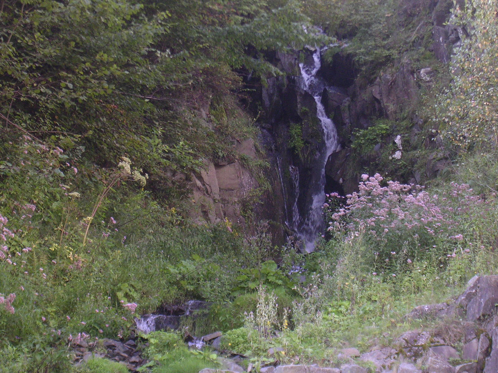 de alex